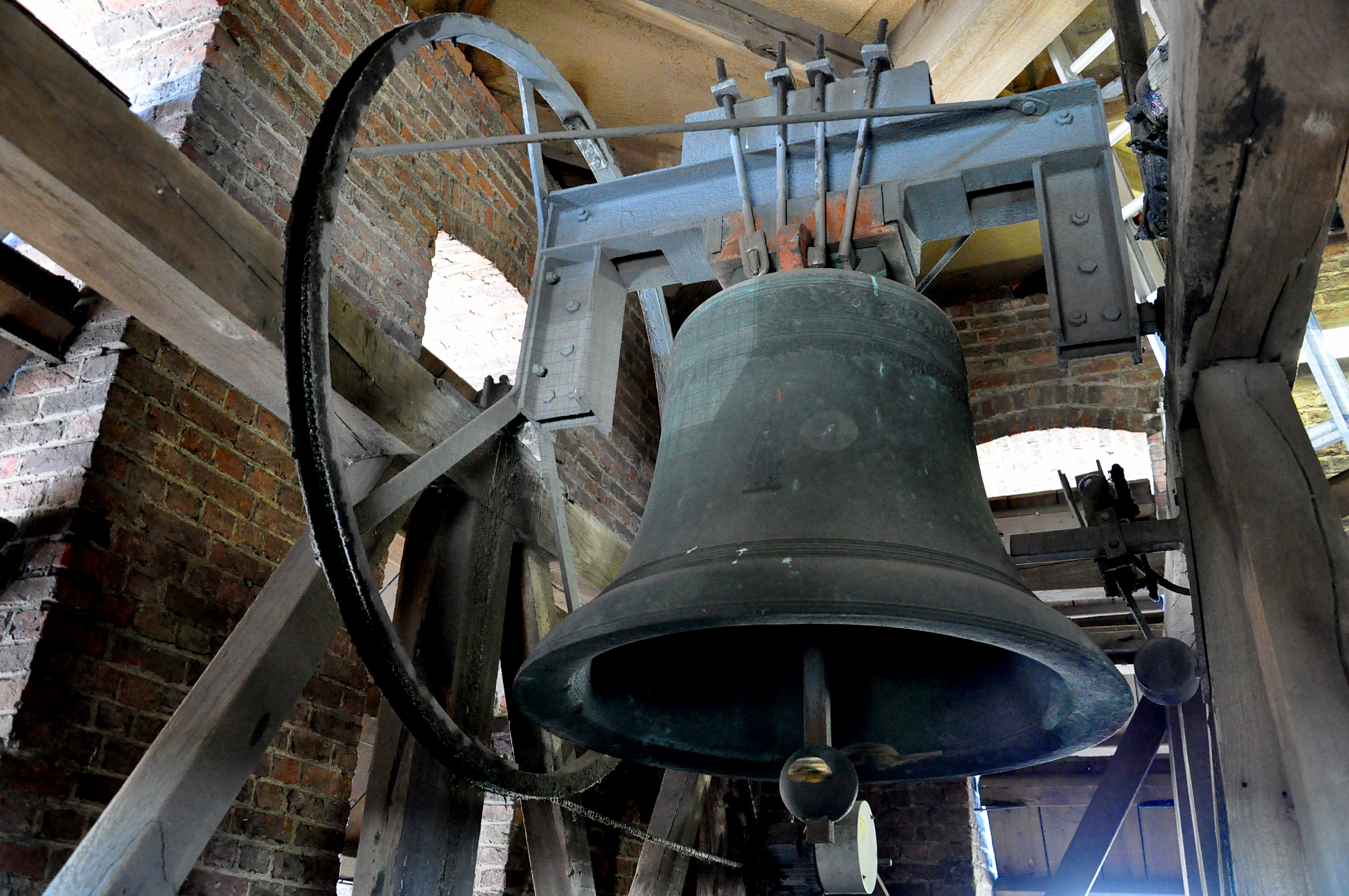 Onze-Lieve-Vrouw Geboortekerk (Overslag) kerkklok